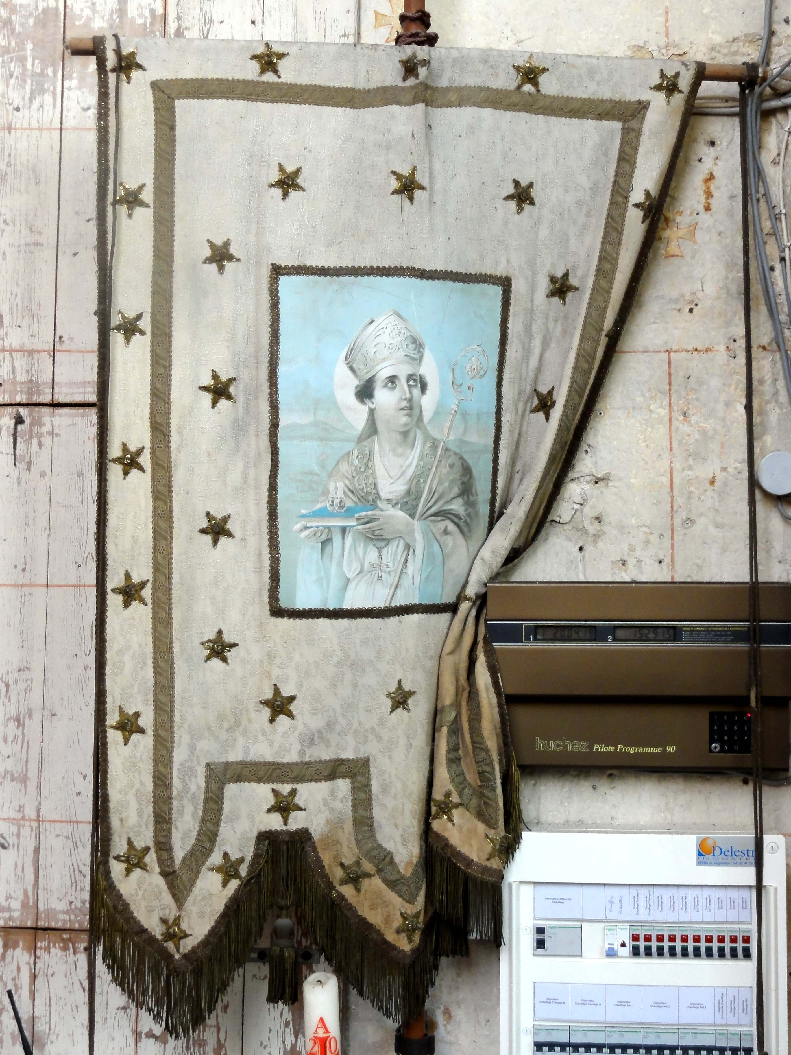 Mobilier de l'église (voir titre).